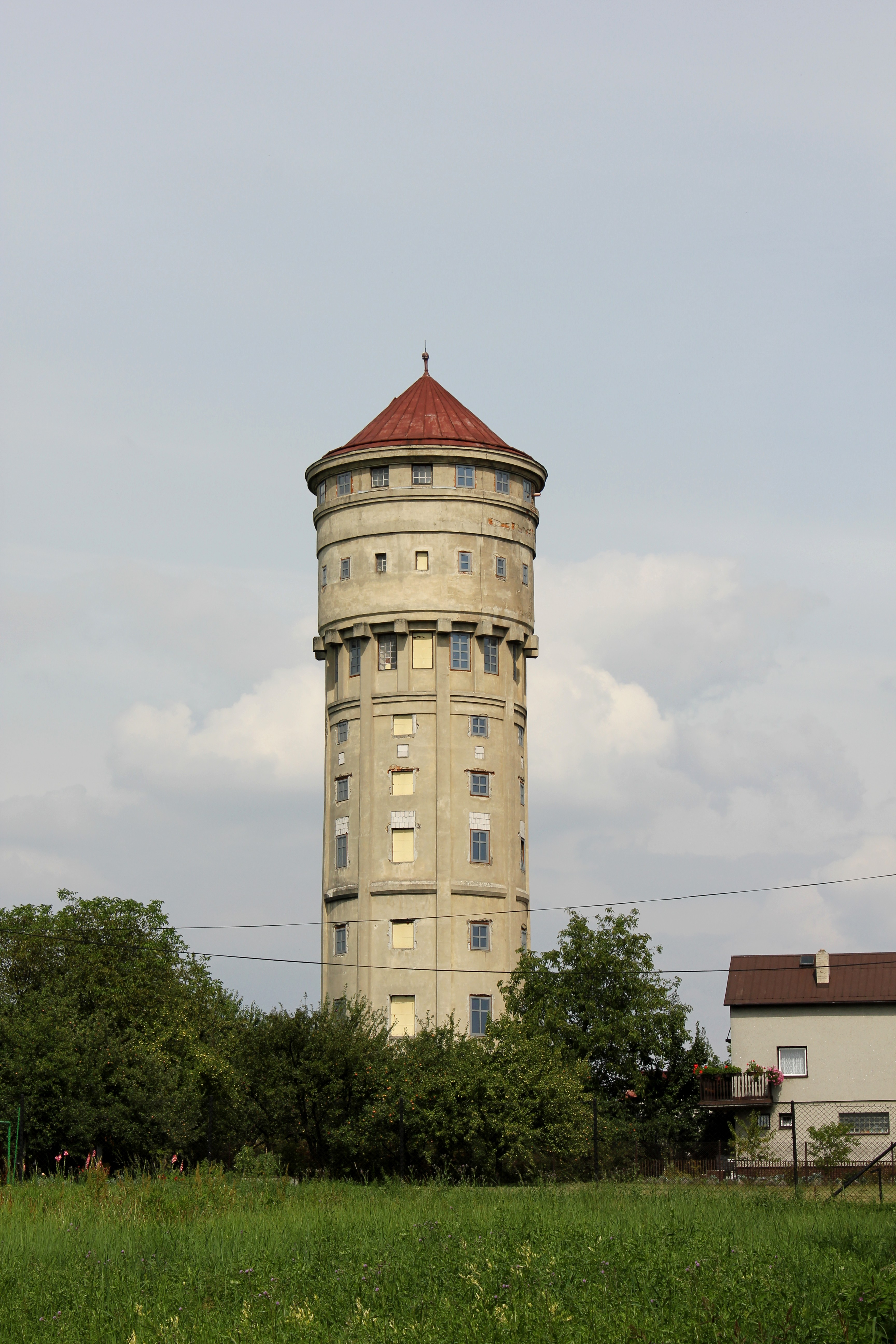 Česky: Vodárenská věž v Karviné-Hranicích.